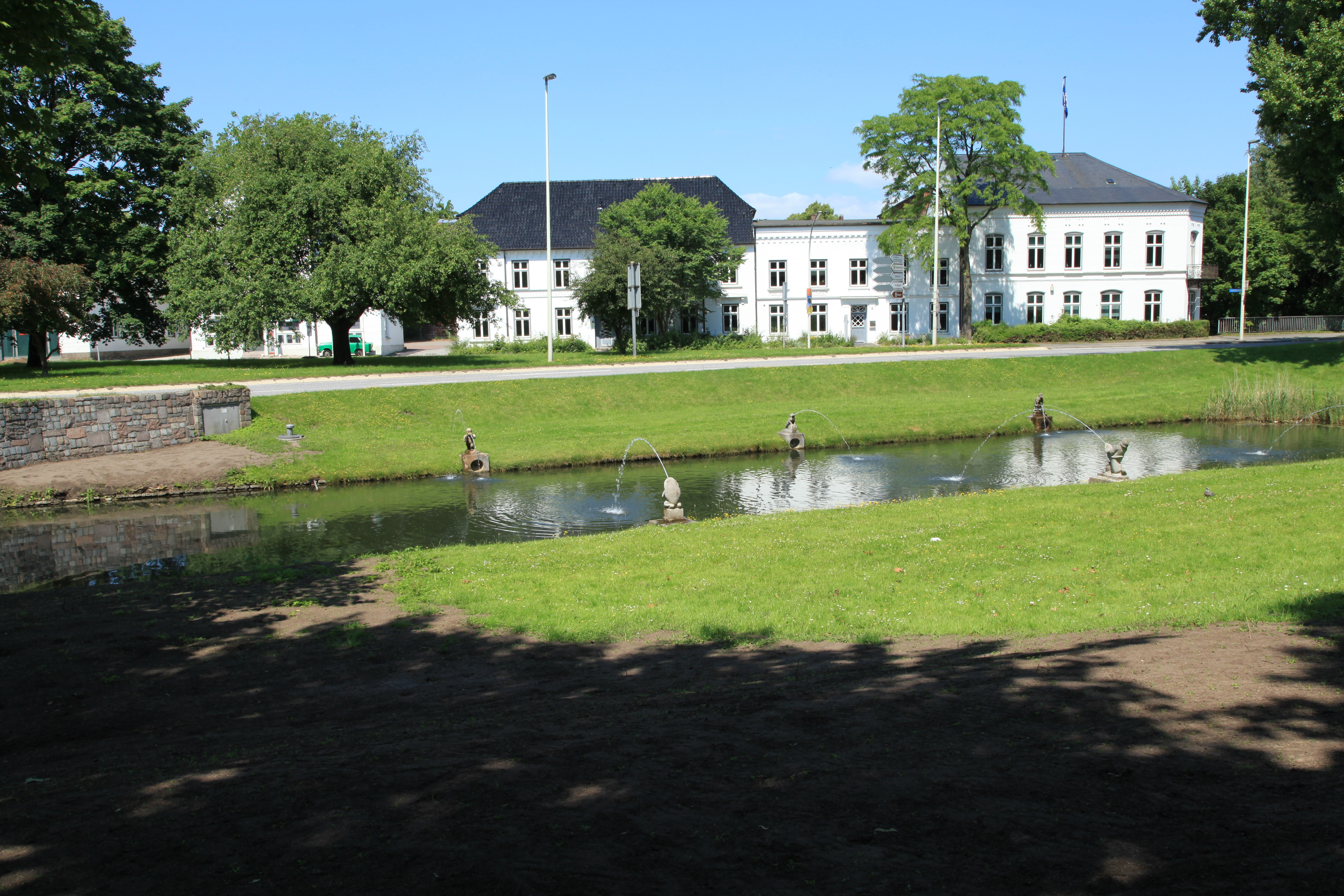 Zu einem Zierteich umfunktioniertes Schleusenbecken des ehemaligen Eiderkanals in Rendsburg